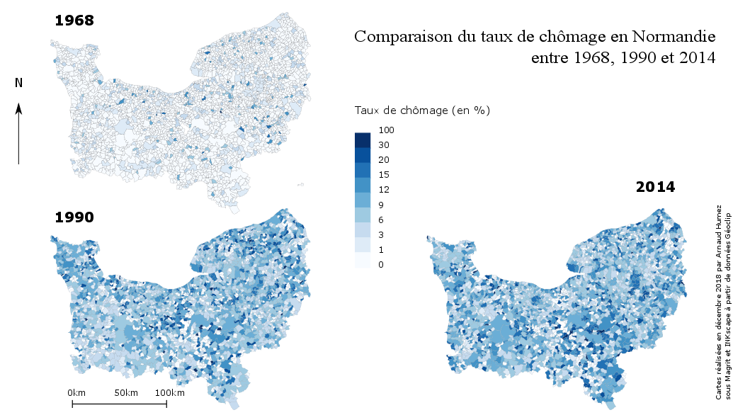 Cette carte est une comparaison du taux de chômage en Normandie entre les années 1969, 1990 et 2014. Cette comparaison a été réalisée grâce à une planche de 3 cartes.